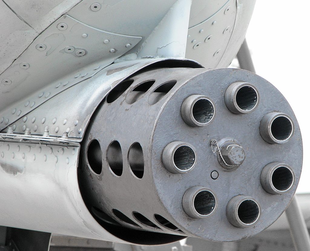 Description/Beschreibung: Mündungsrohre einer General Electric GAU-8/A Avenger, verbaut in einer Fairchild-Republic A-10 auf der ILA 2006 in Berlin General Electric GAU-8/A Avenger in an A-10 Thunderbolt on display at the ILA 2006 in Berlin / Germany Author/Fotograf: Darkone, 20. Mai 2006